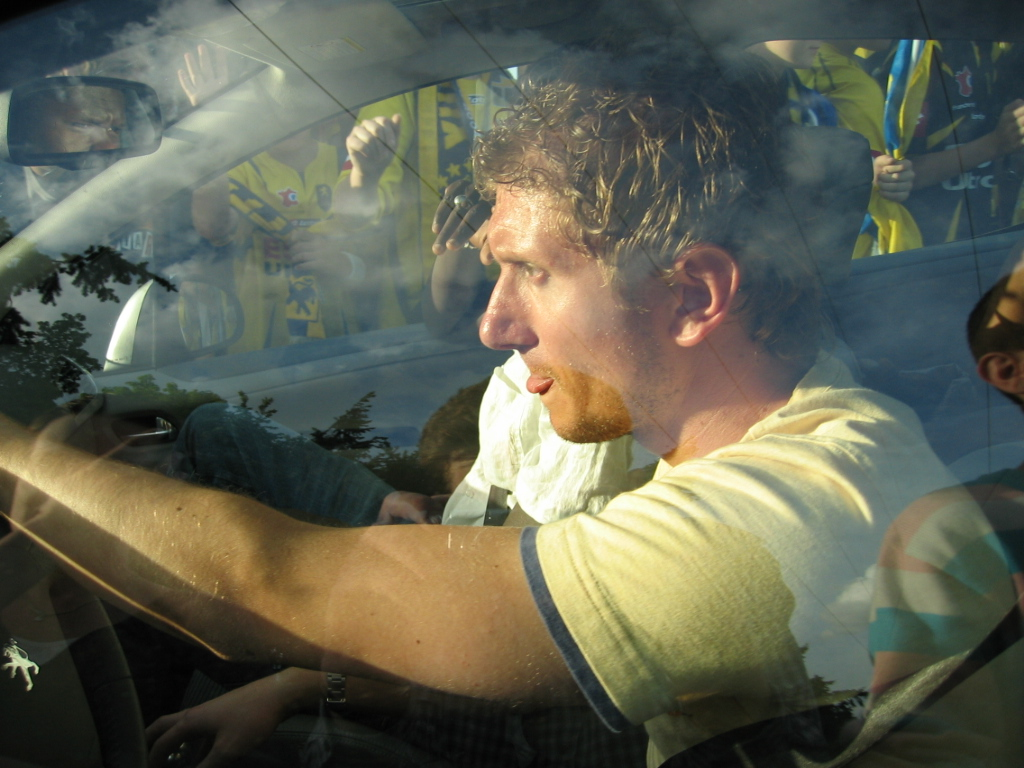 Jérémy Gavanon, gardien de but du FC Sochaux, vainqueur de la Coupe de France 2007, jour du retour du FC Sochaux du Stade de France à Sochaux